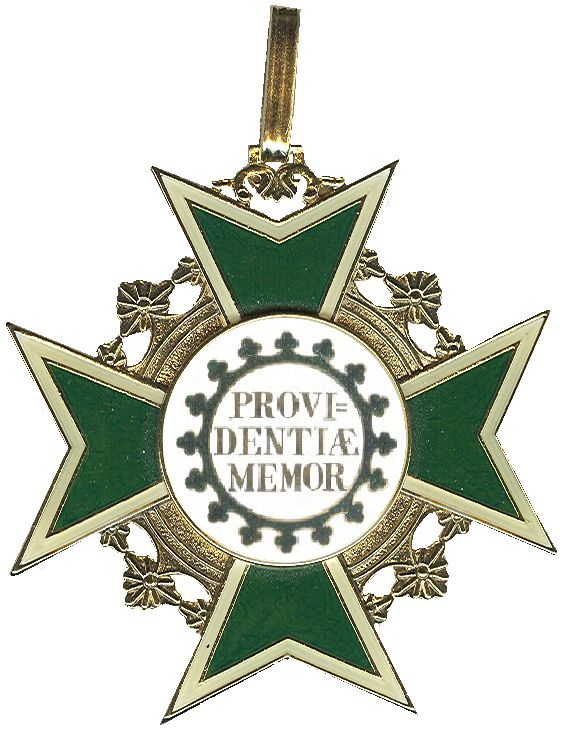 Kleinood Rautenkrone, groene emaille, achterzijde. Particuliere verzameling, Groningen.